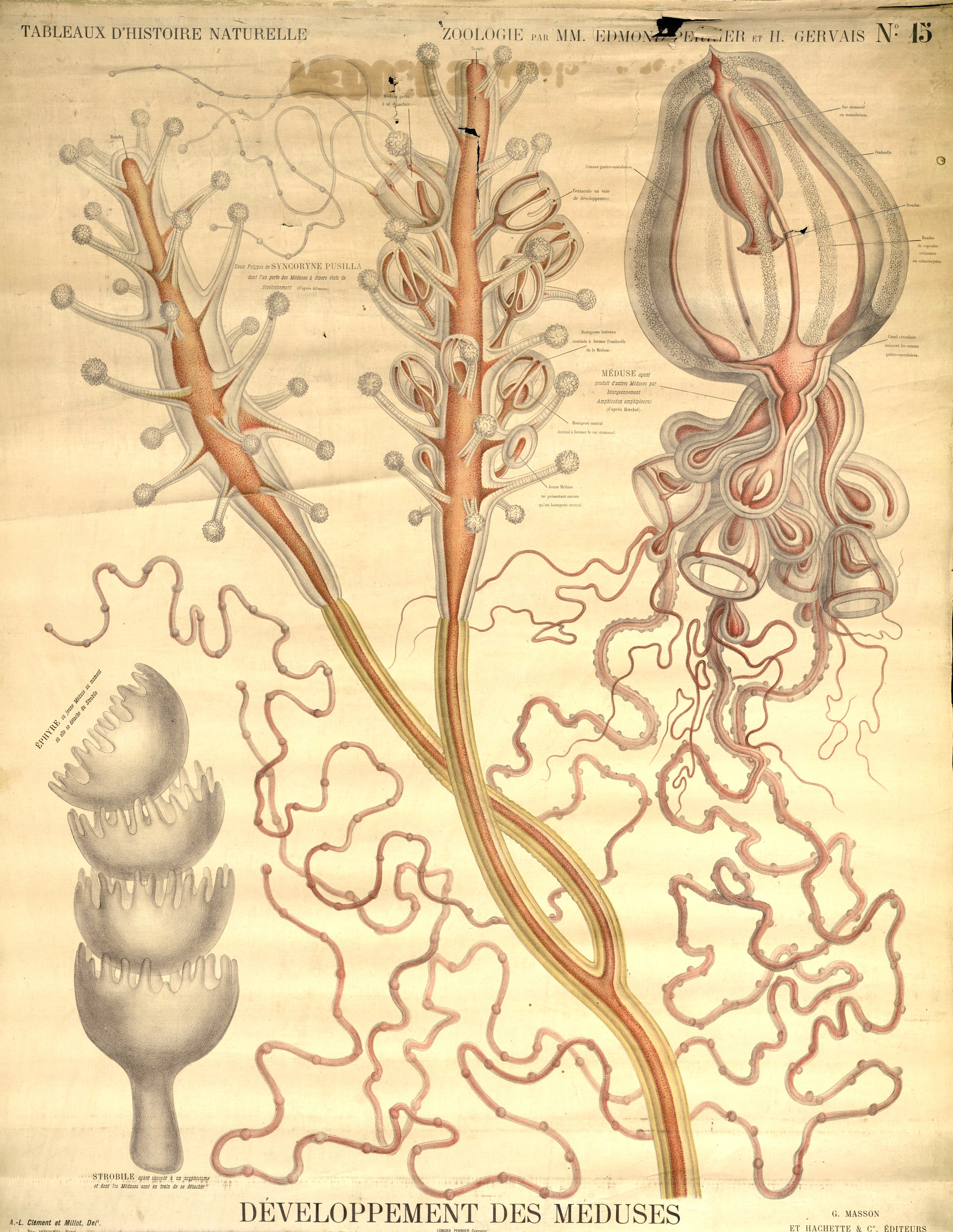 Développement des méduses. Bibliothèque Numérique de l'Université d'Artois. Retrieved on 26 March 2016.